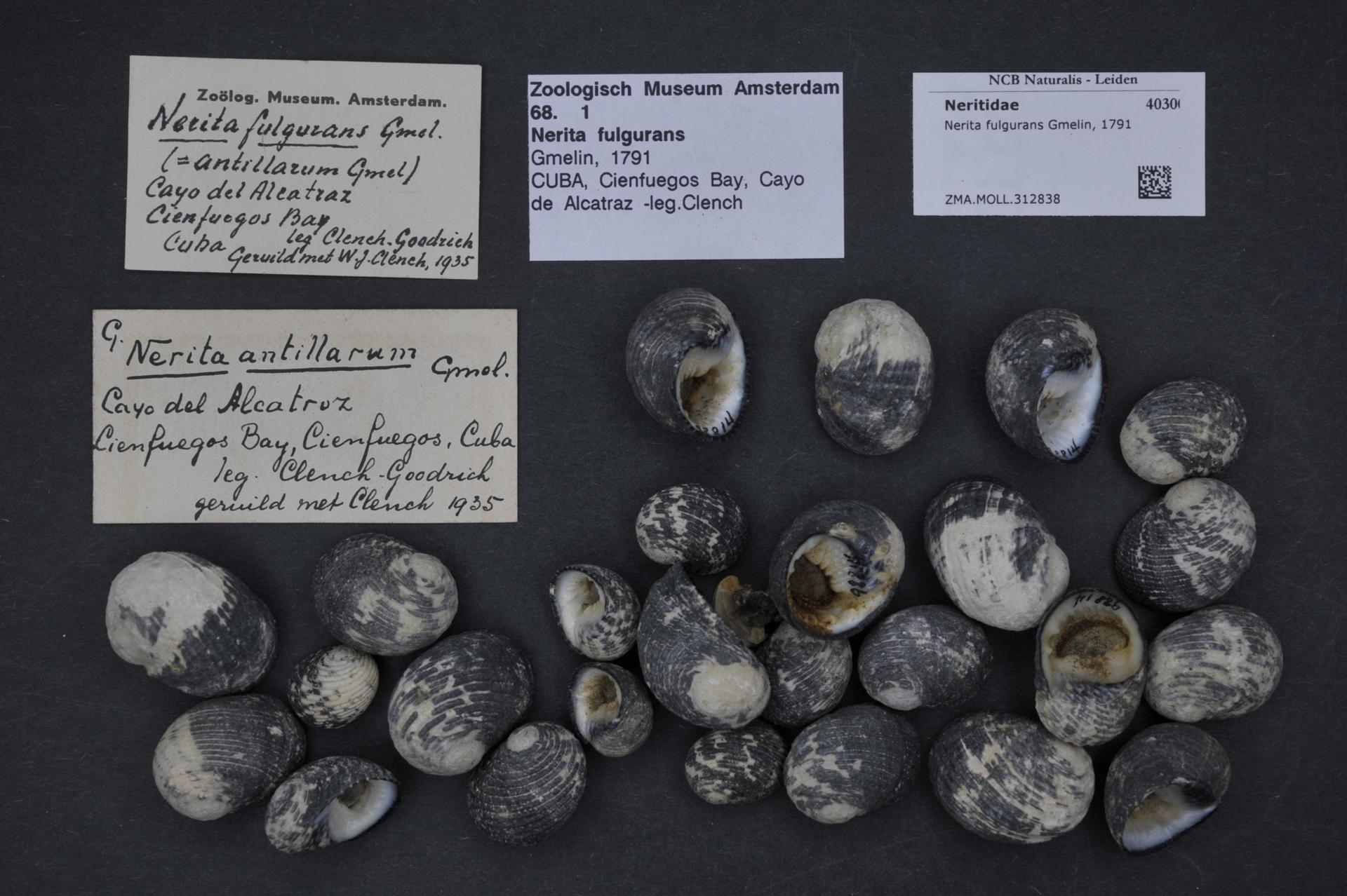 Nerita fulgurans Gmelin, 1791